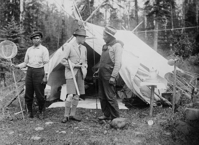 Title / Titre : The Prince of Wales with guides at Lake Nipigon, in Northern Ontario, 1919 / Le prince de Galles accompagné de guides au lac Nipigon, dans le Nord de l’Ontario, 1919 Creator(s) / Créateur(s) : Unknown / Inconnu Date(s) : September 5-7, 1919 / 5-7 septembre 1919 Reference No. / Numéro de référence : MIKAN 3194396, 3624612 Location / Lieu : Lake Nipigon, Ontario, Canada / Lac Nipigon, Ontario, Canada Credit / Mention de source : Library and Archives Canada, PA-022329 / Bibliothèque et Archives Canada, PA-022329